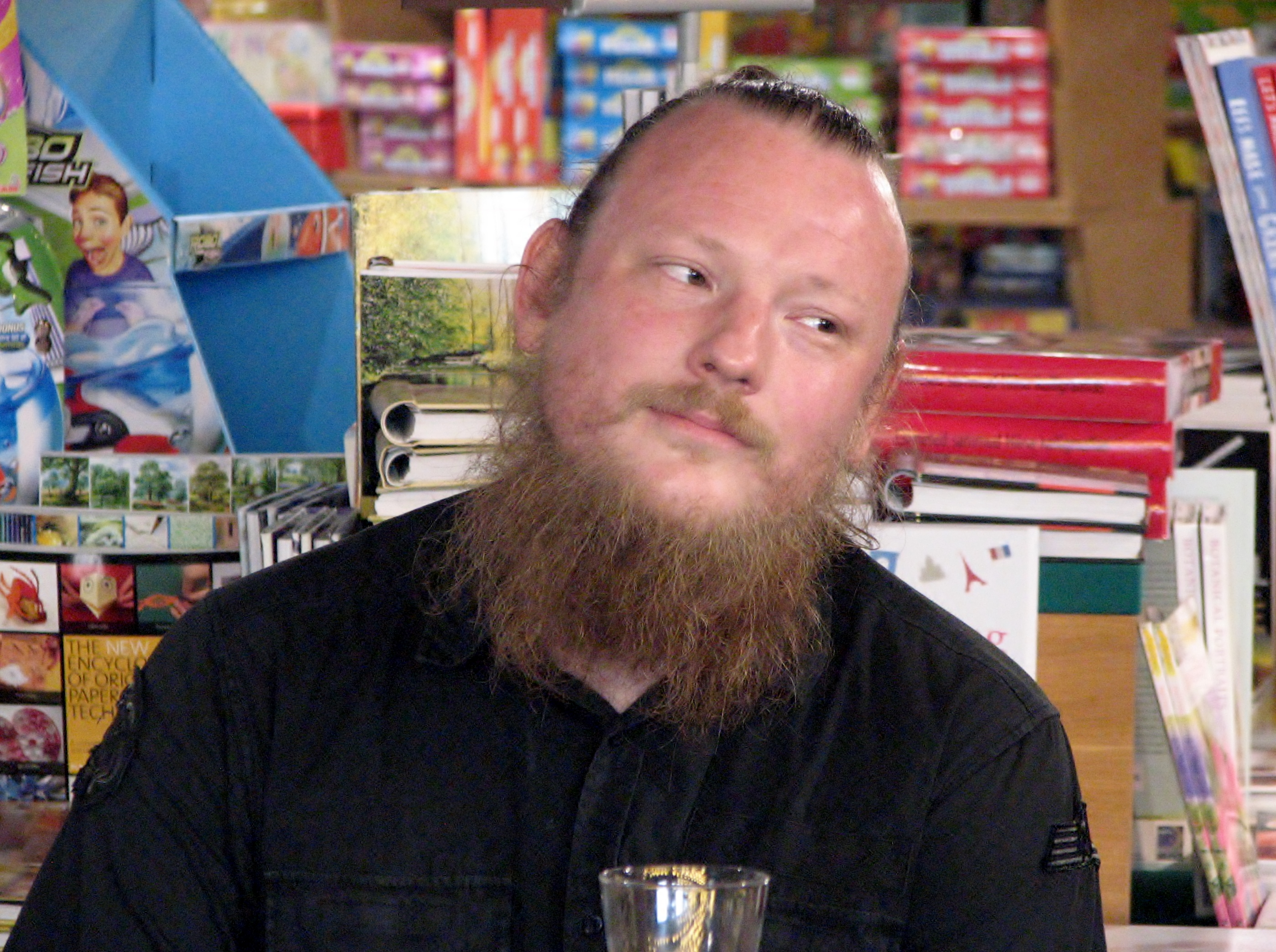 Mart Kalvet esinemas kirjandusfestivali HeadRead raames Viru Keskuse Rahva Raamatus